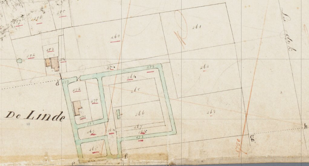 558 Kadasterkaart Marum C 1 (de Linde), 1832 (minuutplan). De Linde met boven de Oosterlinde en rechts de Leidijk. Ter oriëntatie: boven is oost.